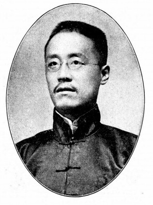 中文（台灣）: 中華民國國會議員